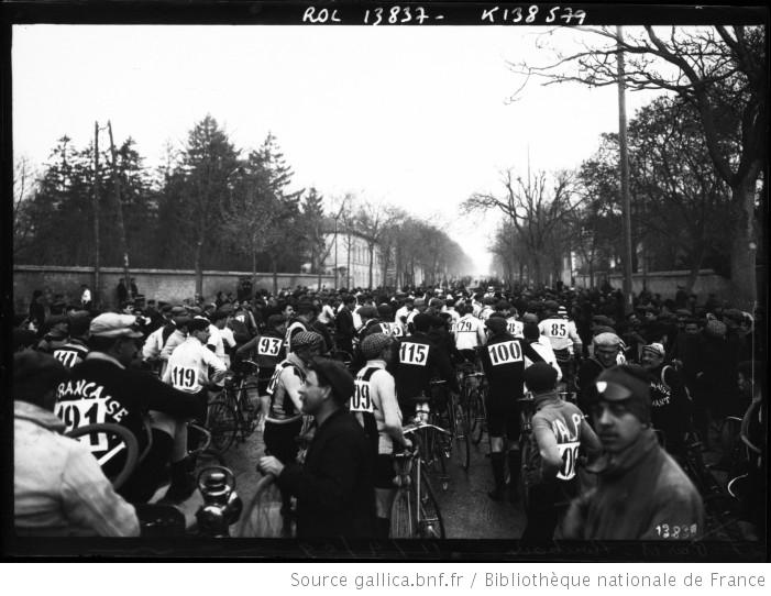 Départ du Paris-Roubaix 1909